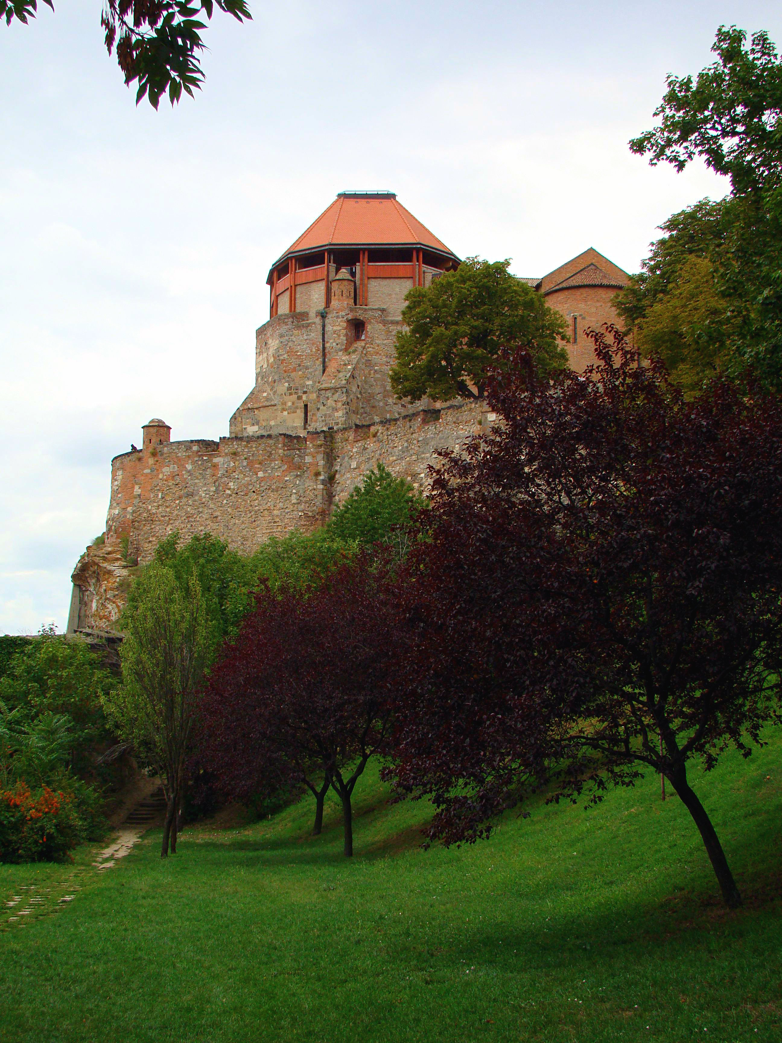 vár, a királyi, majd érseki palota maradványainak együttese This is a photo of a monument in Hungary. Identifier: 91100